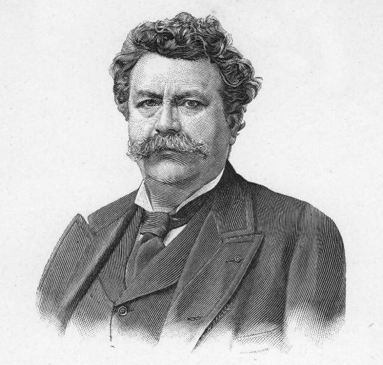 Portrait de Charles Albert Waltner - Gravure